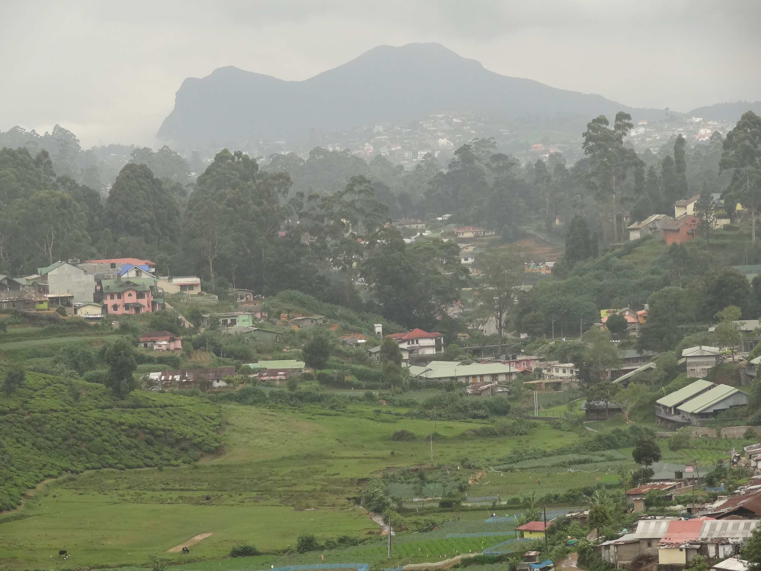 Nuwara Eliya